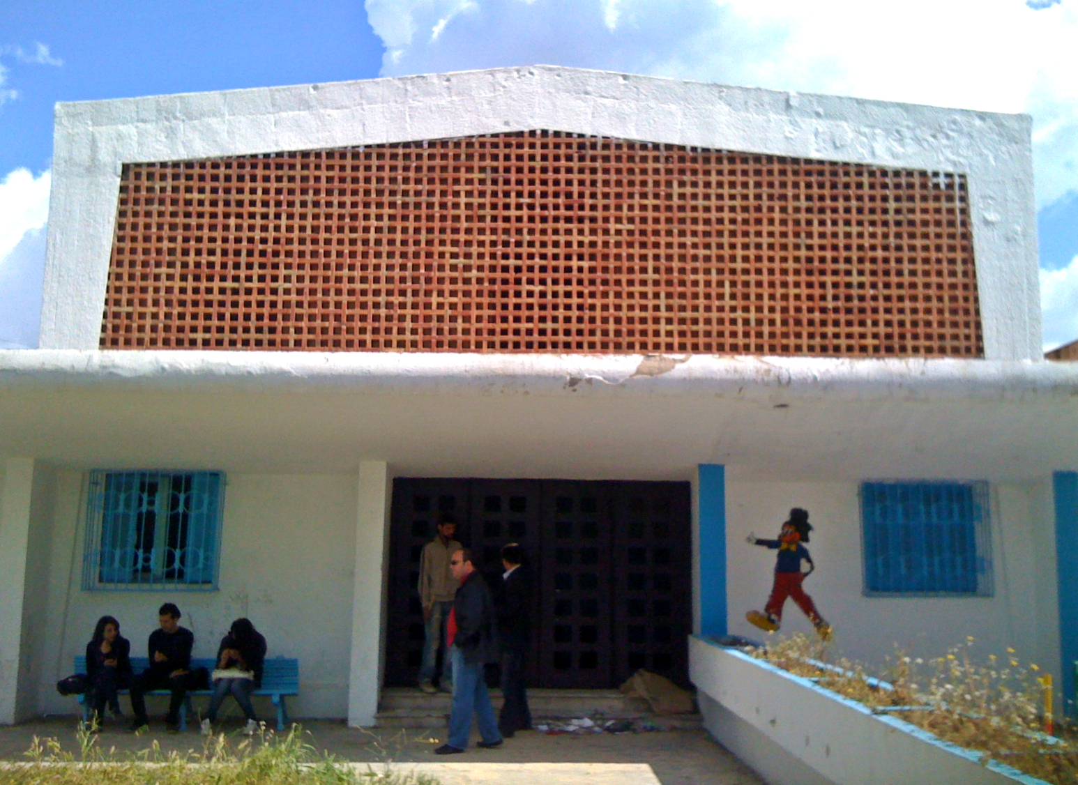 La Chapelle de Mégrine-Lescure au début des années 2000